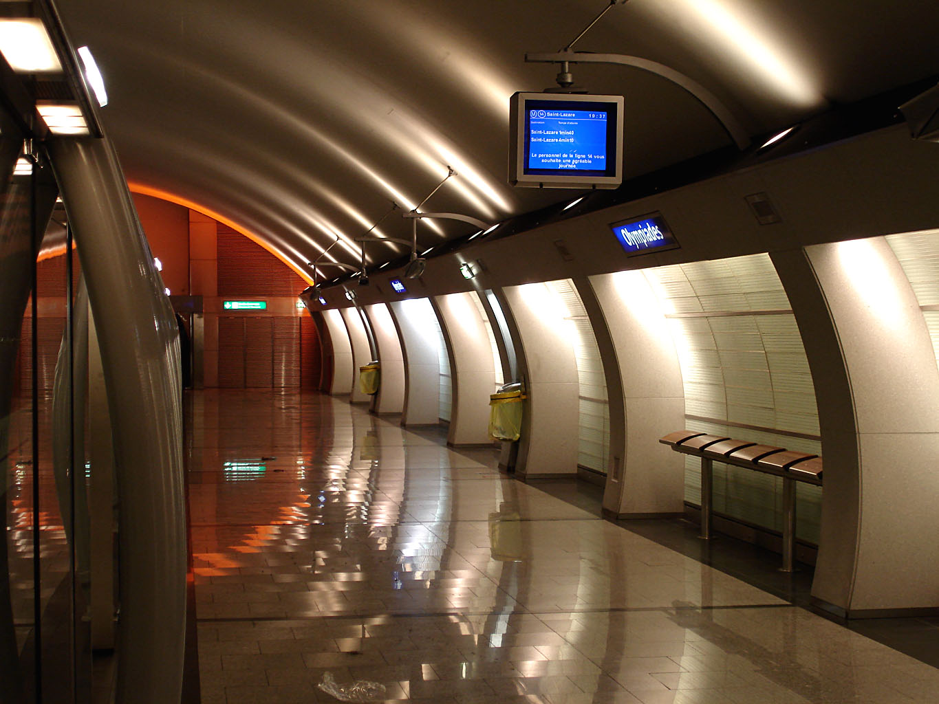 La station Olympiades de la ligne 14 du métro de Paris, France